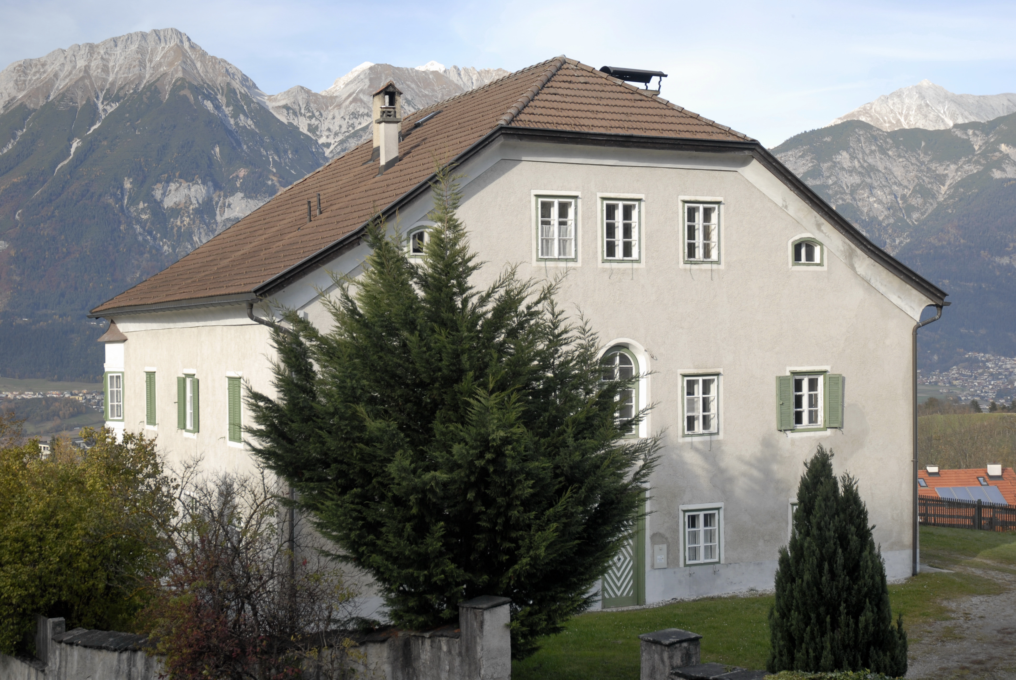 Aldrans, Ansitz Brandthausen, Brandlhof, Rinner Straße 5